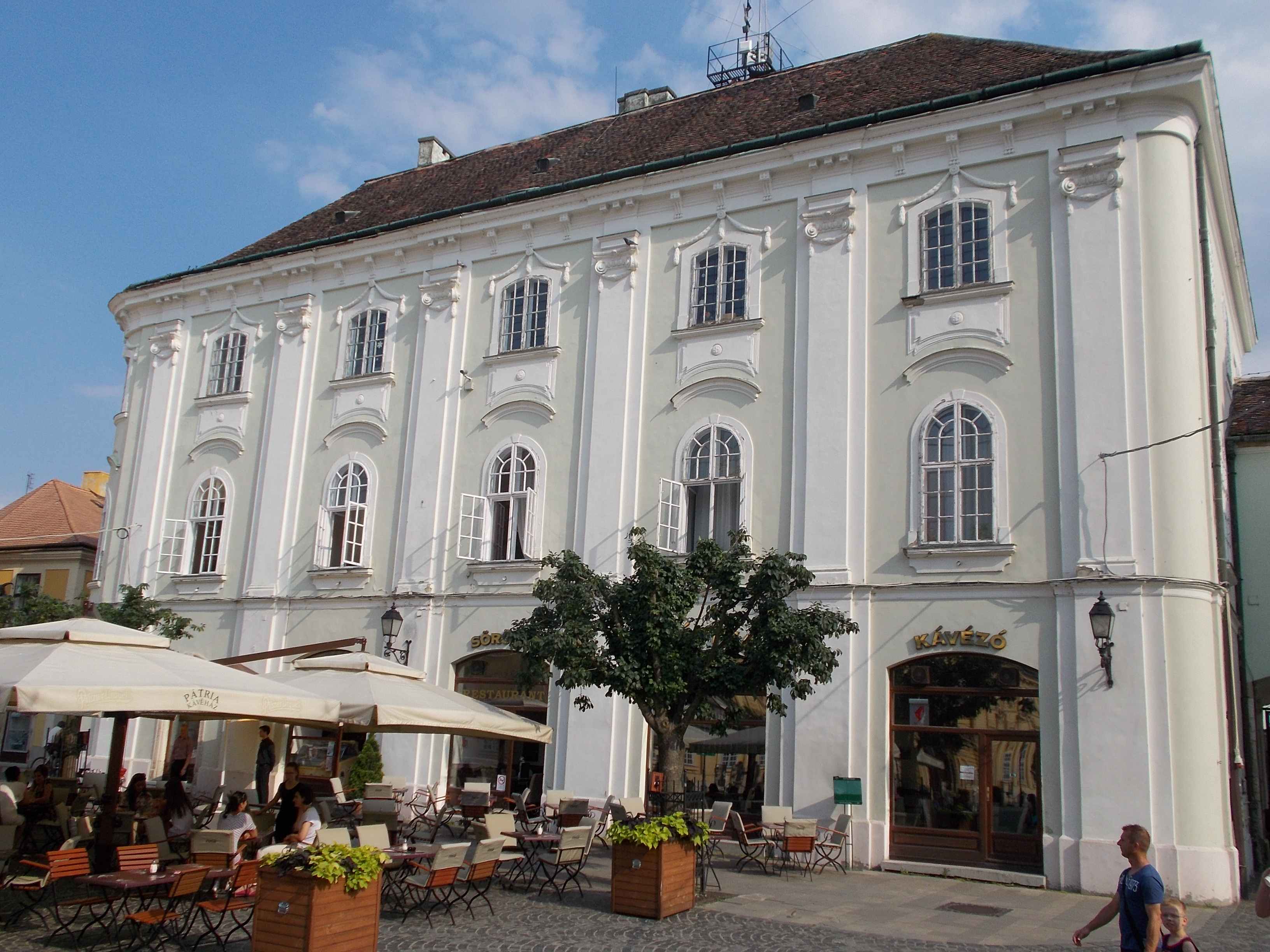 Zichy-palota Műemlék épületének Városház tér felőli ún. mellékhomlokzata. ID 3843. Most Kávéház és Étterem, valamint a városháza irodái. Copf, 1781. Bővítve 1936-1937-ben.- Székesfehérvár, Kossuth u. 1., Városház tér 1. This is a photo of a monument in Hungary, Identifier: 3843